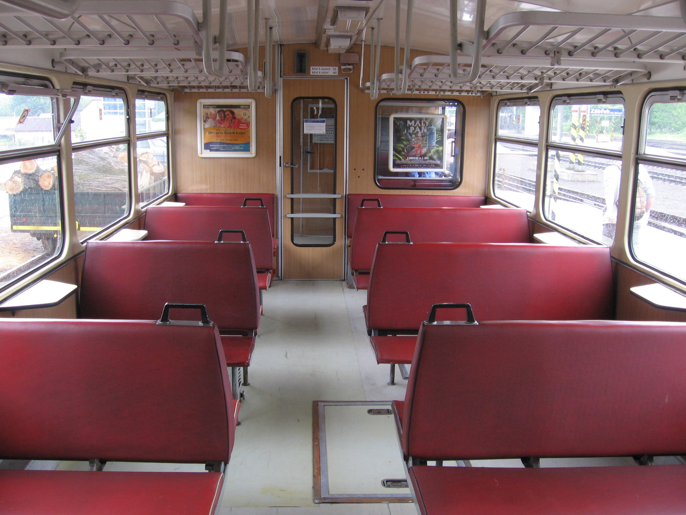 Interiér vozu 810.431